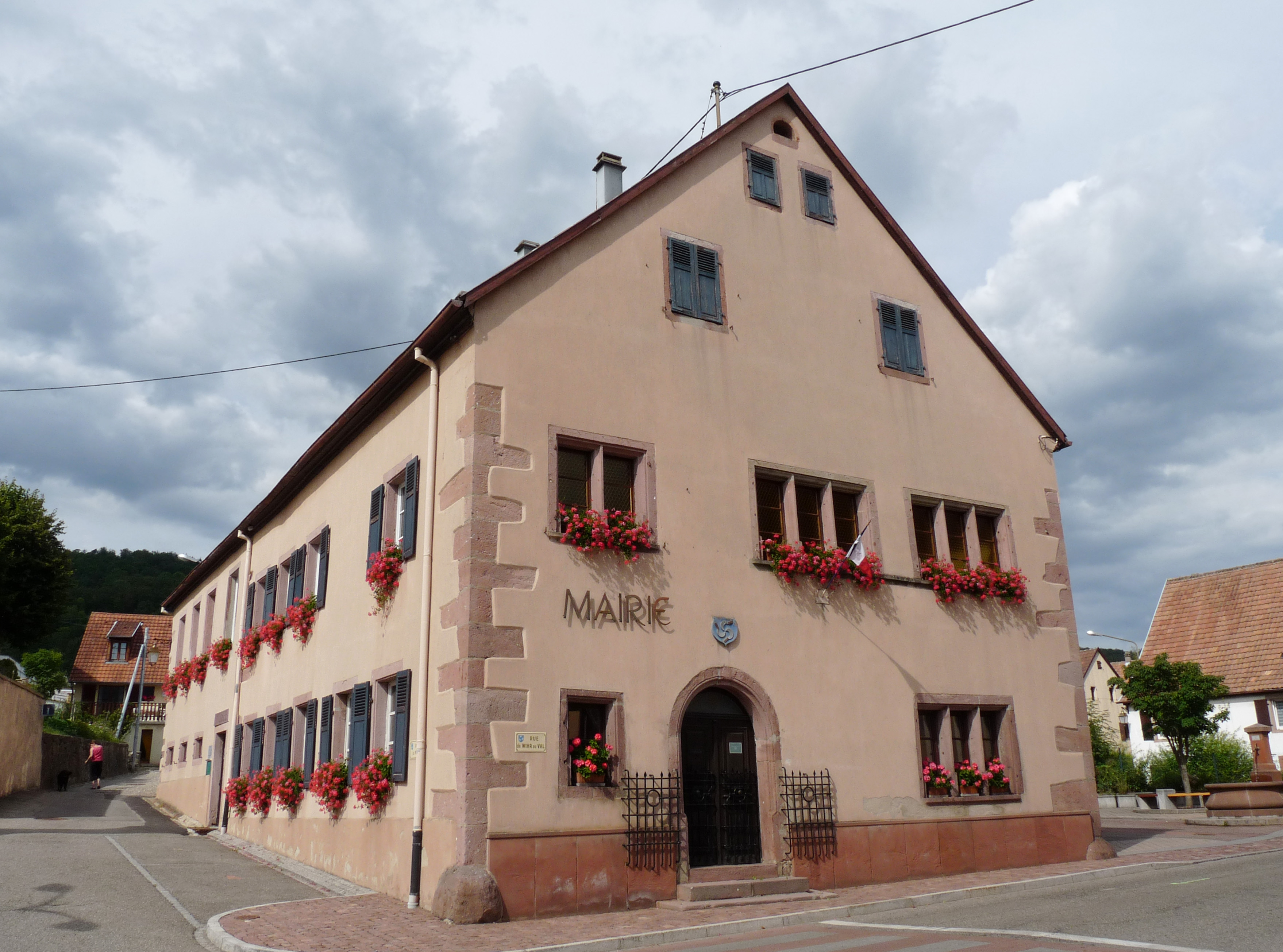 Mairie de Gunsbach (Haut-Rhin)